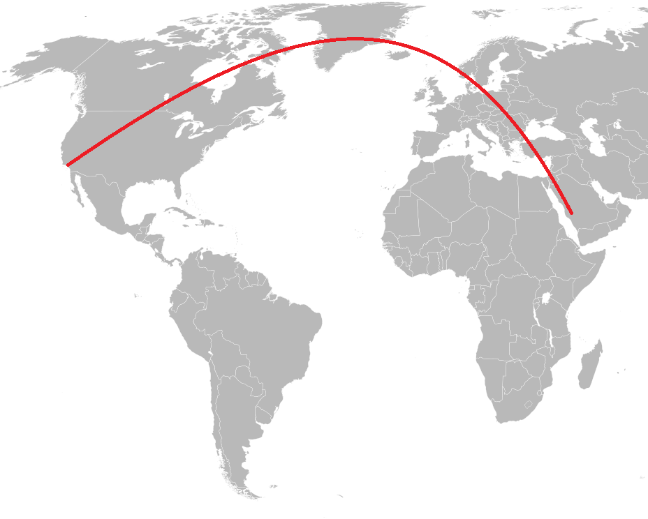 Направление киблы из Лос Анджелеса